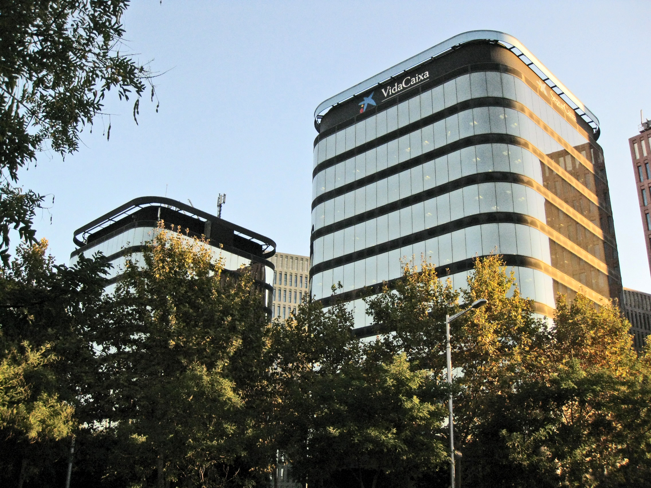 Dues de les tres Torres Cerdà, amb la Torre VidaCaixa a la dreta, que acull les oficines centrals d'aquest grup assegurador de la Caixa, a la plaça Cerdà de Barcelona.